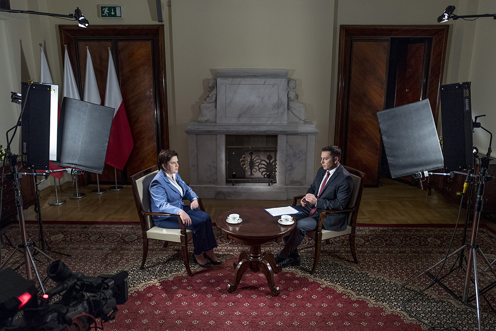 Premier Beata Szydło w programie "Dziś Wieczorem" (TVP), prowadzi Michał Adamczyk.